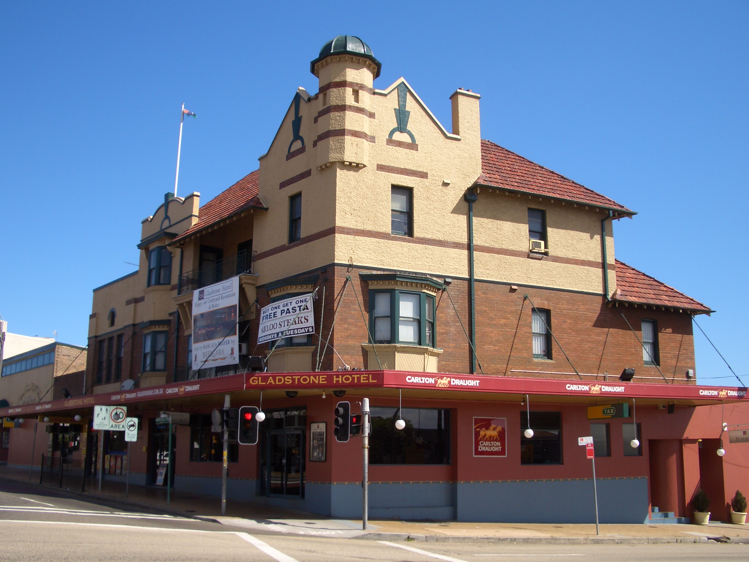 Gladstone Hotel, Dulwich Hill